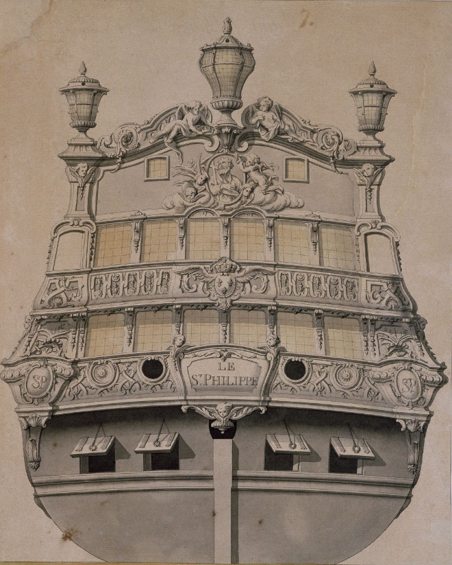 Poupe du vaisseau français le Saint-Philippe. 1721. Musée de la Marine.